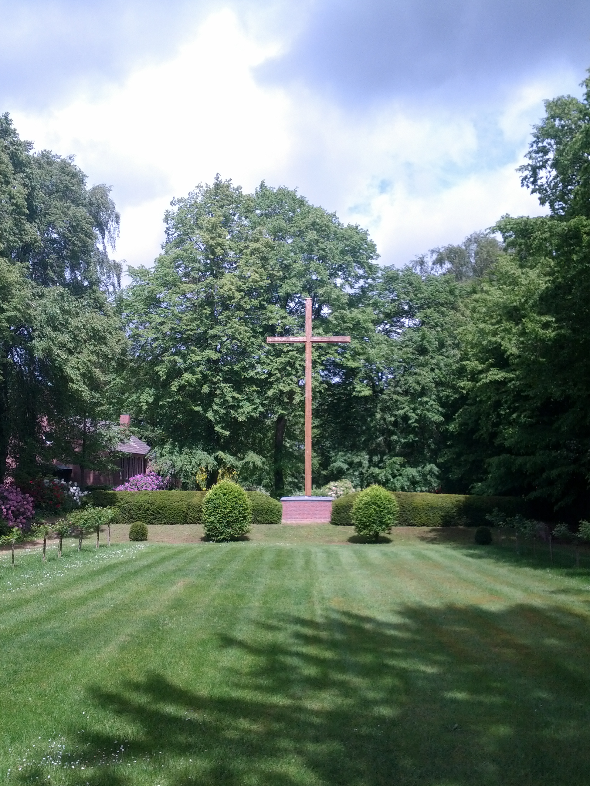 Gedenkanlaag för de Doden un Vermissten ut’n Tweten Weltkrieg op’n Karkhoff von Hornborg (Waldkarkhoff)